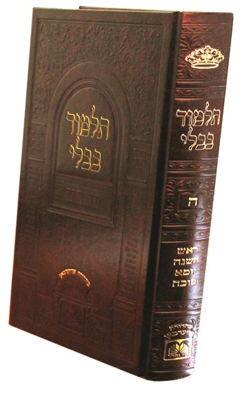 עטיפת גמרא בודדת מסט תלמוד בבלי עוז והדר